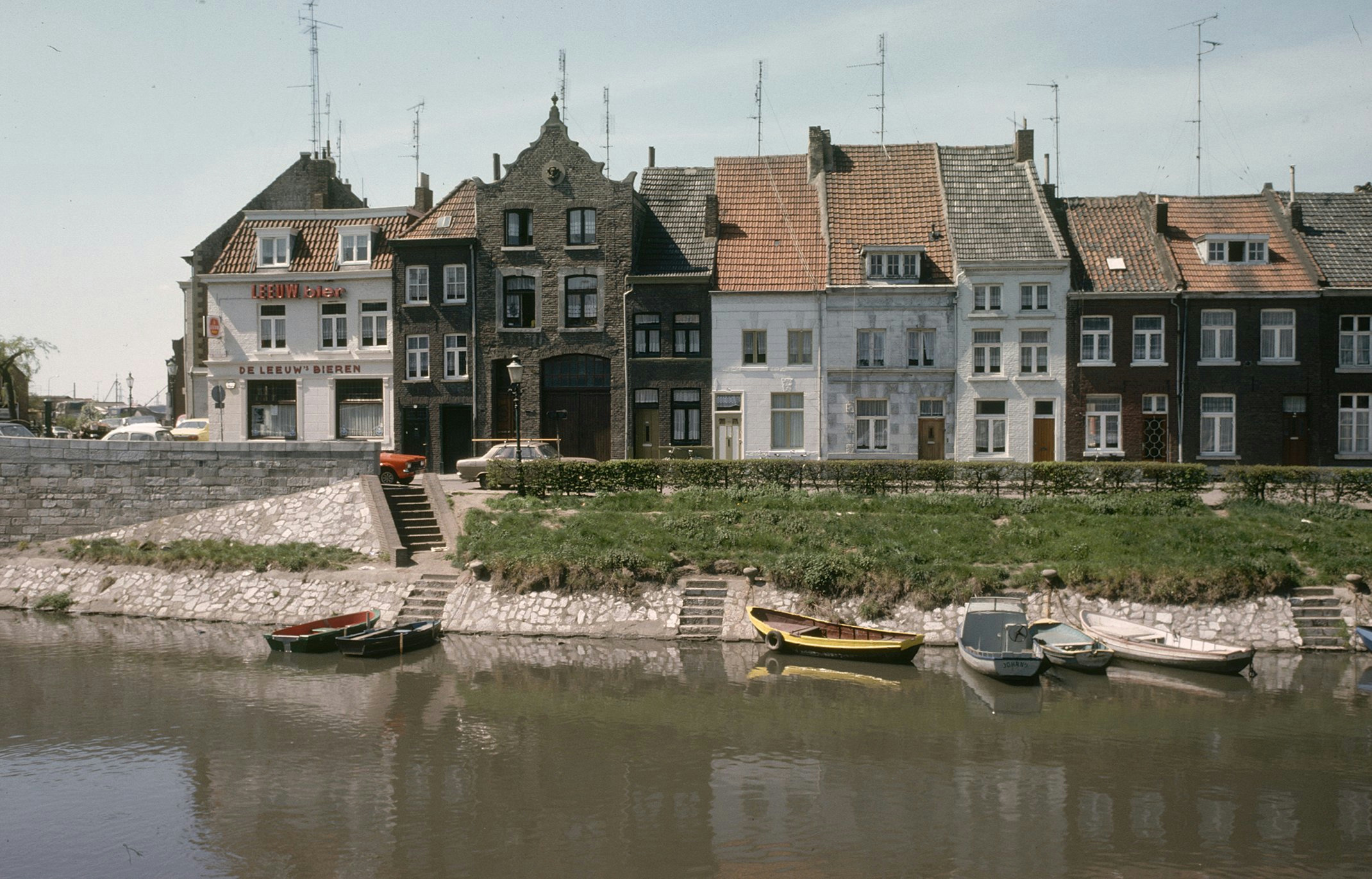 Exterieur OVERZICHT VOORGEVELS